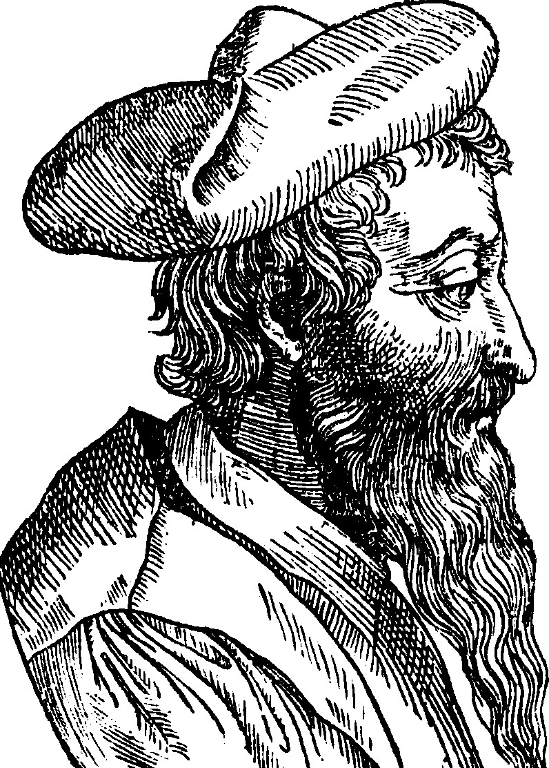 Retrato de Vicentino